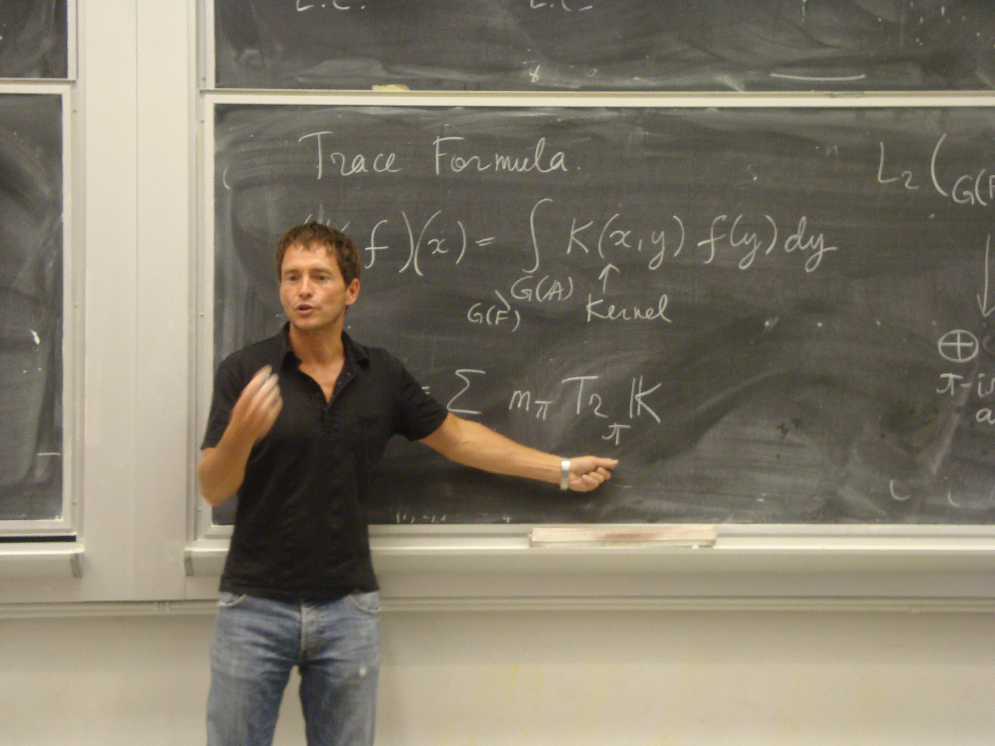 Matematikeren Edward Frenkel under et foredrag om geometrisering af sporformler på University of California, Berkeley, 16. september 2010.